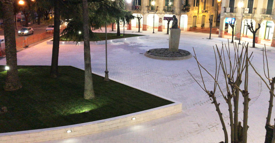 Scorcio di Piazza XXV Luglio nel centro di Cosenza